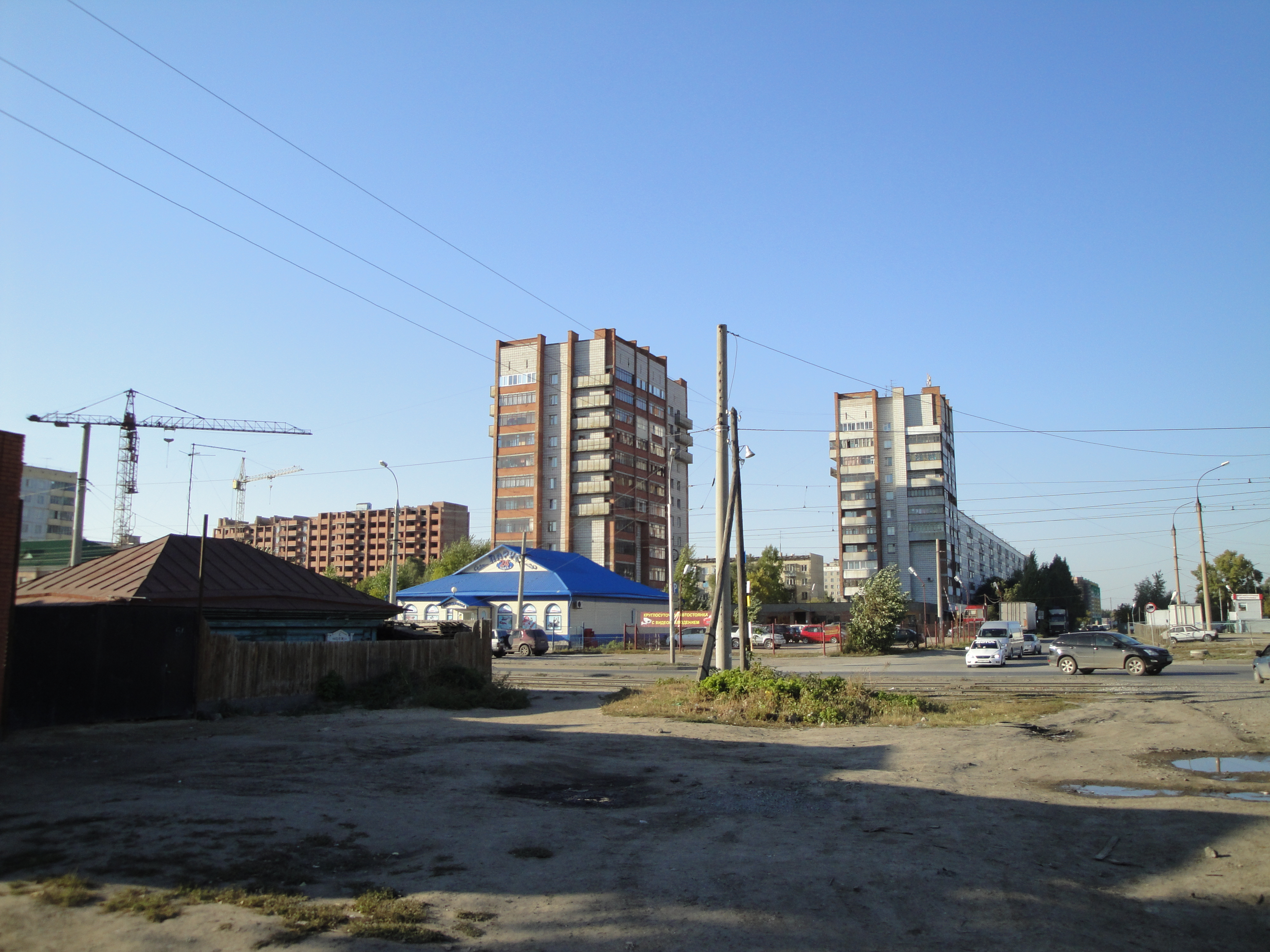 Новосибирск - Пересечение Титова и Связистов - (ост. Парашютная)